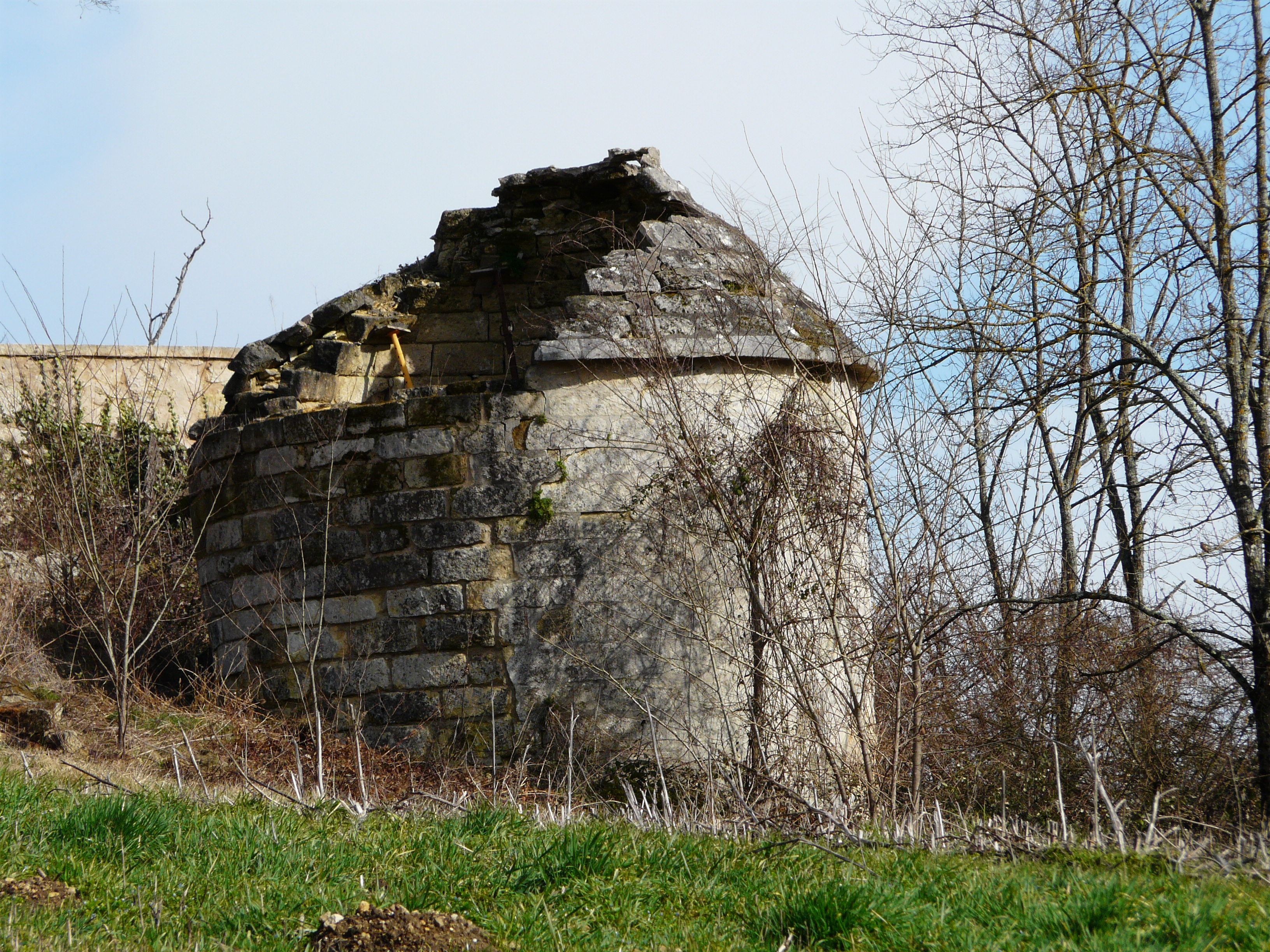 Le pigeonnier ruiné de la Roche Pontissac, Saint-Front-d'Alemps, Dordogne, France.